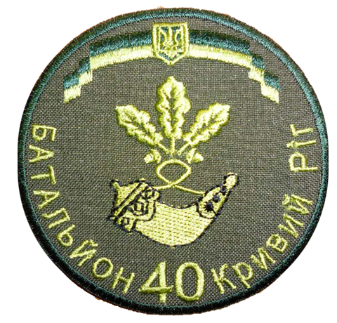 Нарукавний шеврон 40 б ТрО «Кривий Рiг».